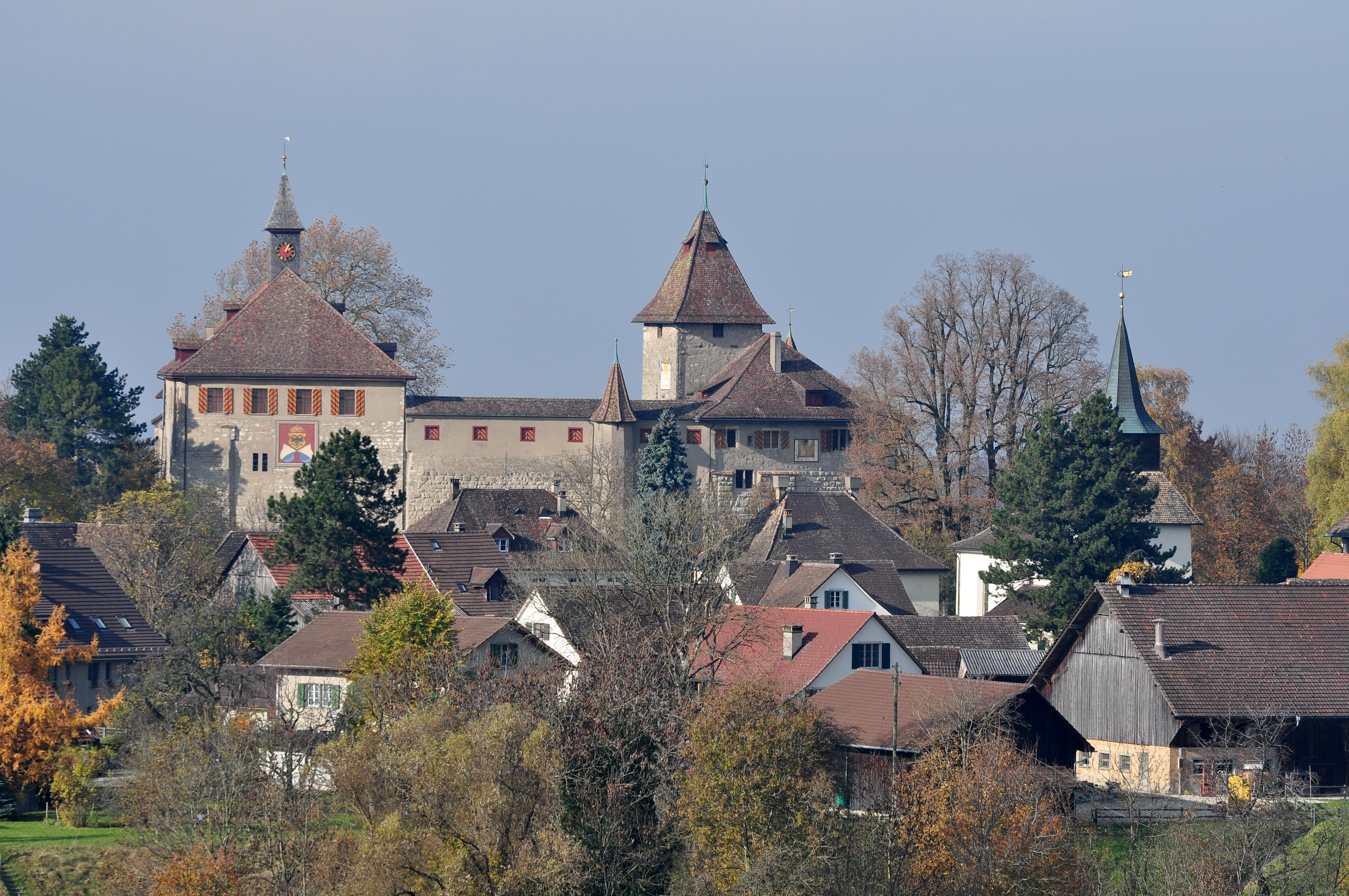 Schloss Kyburg in Kyburg (Switzerland)